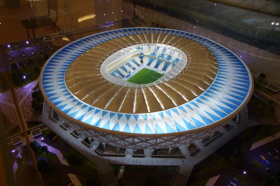 Модель стадиона "Волгоград Арена"